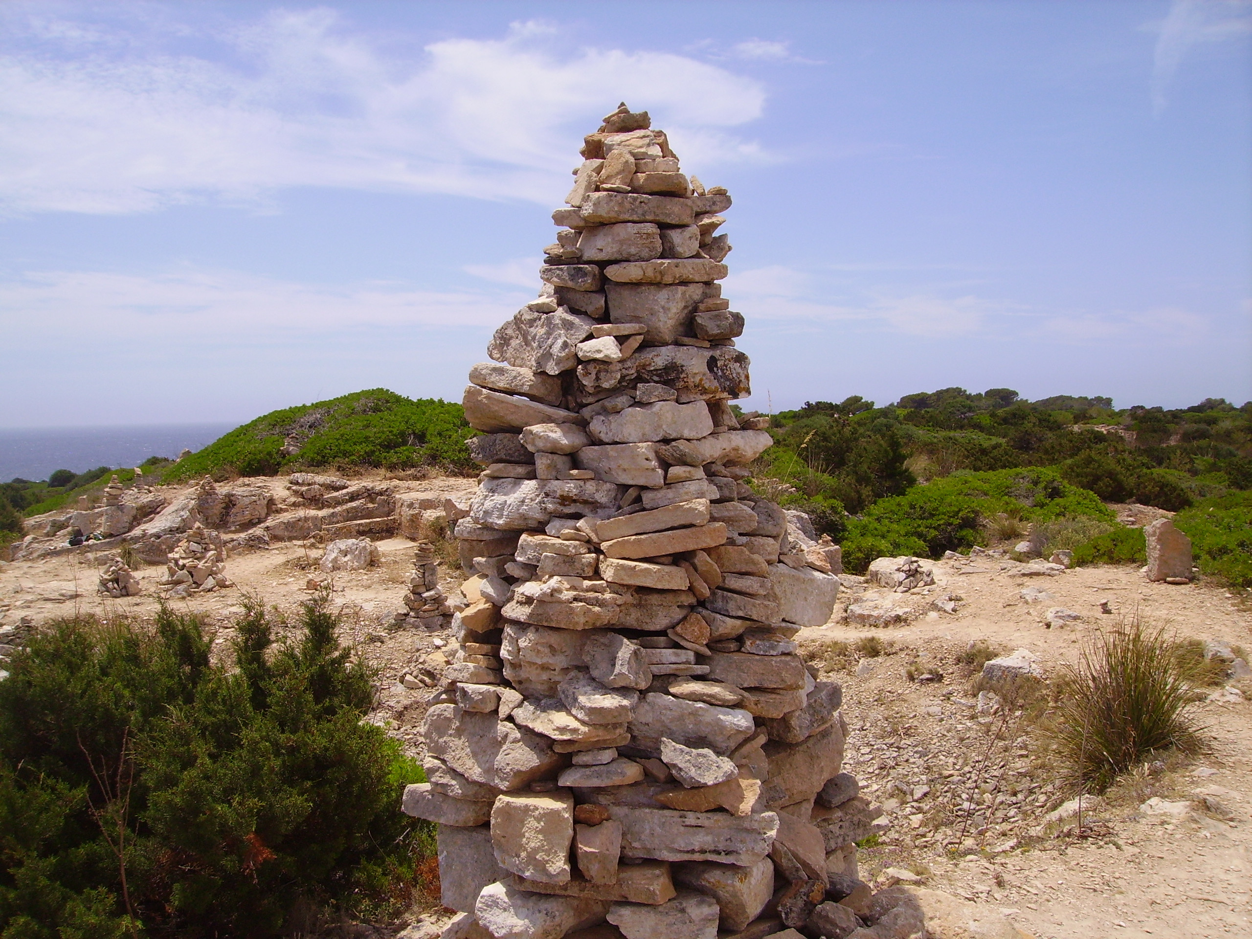 Steinhaufen / Punta de n´Amer / Mallorca